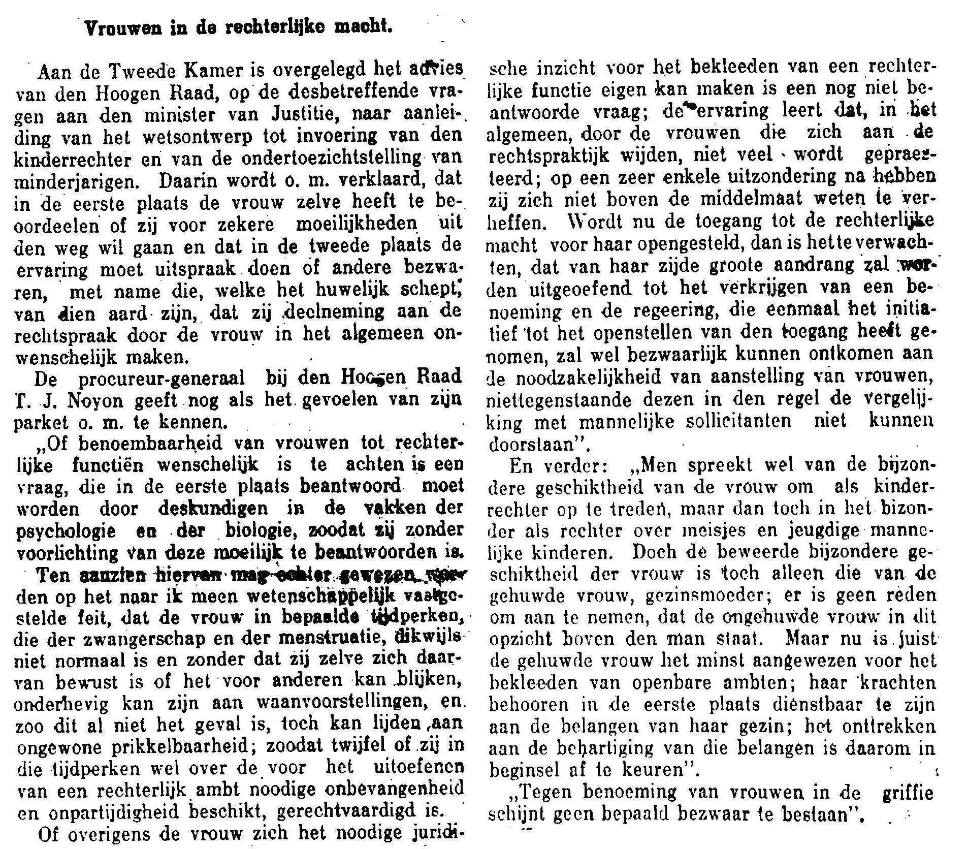 Tarquinius Noyon, artikel over vrouwen in de rechtspraak